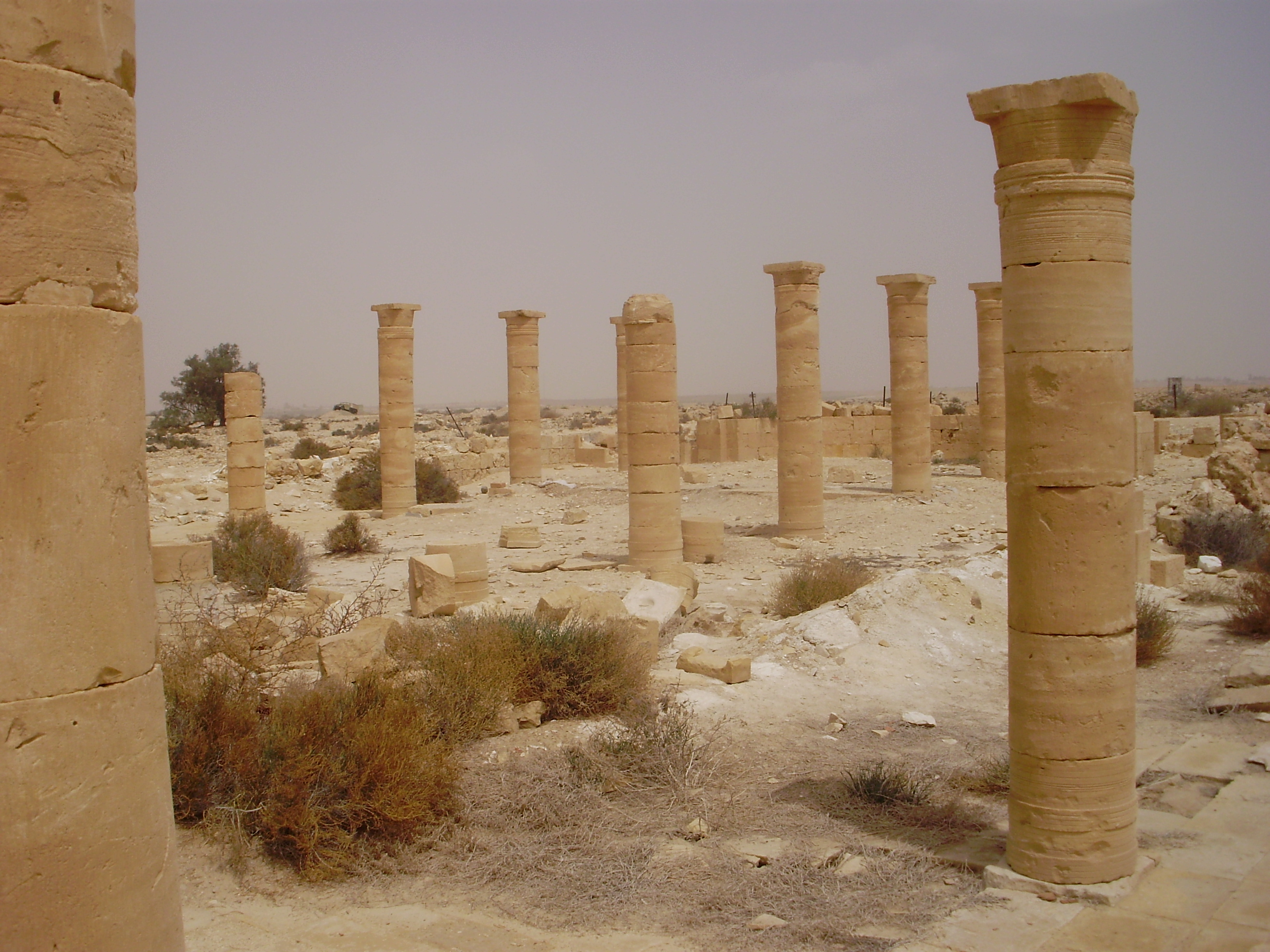 Site archéologique de Tel Nitzana (parfois écrit Nizzana).